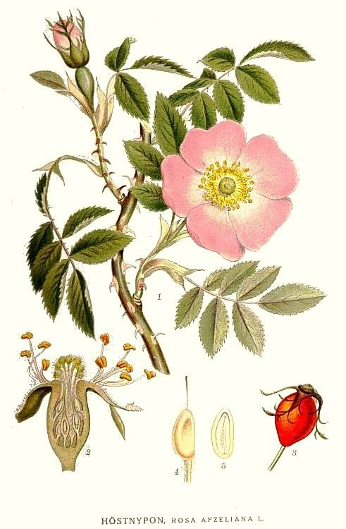 Rosa dumalis Bechst., syn. Rosa afzeliana Fr. Original Description Höstnypon, Rosa afzeliana L.